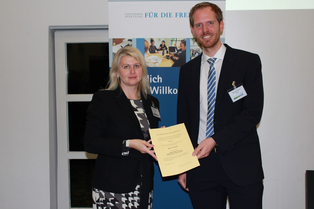 Wolf-Erich-Kellner-Preis Verleihung 2017. Manuel Limbach, Laudatorin Prof. Elke Seefried